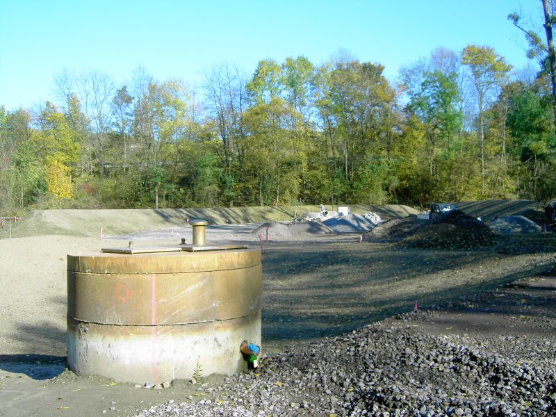 Baustelle am Geysir Andernach (Namedyer Werth) im Oktober 2005; unter der Kanaldeckeleinfassung befindet sich der Geysir